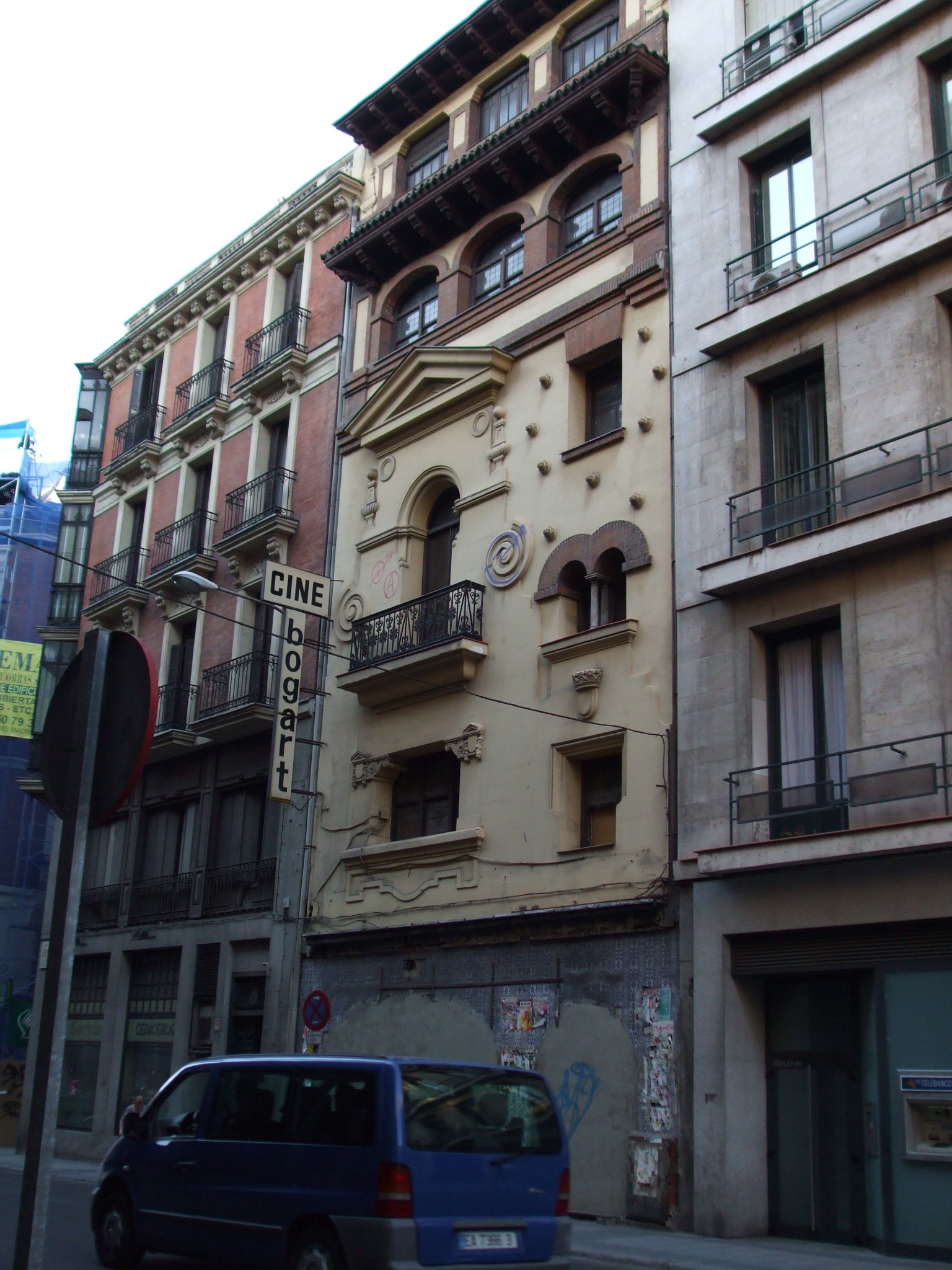 Cine Bogart / Teatro Arniches (Madrid) tras de la okupación